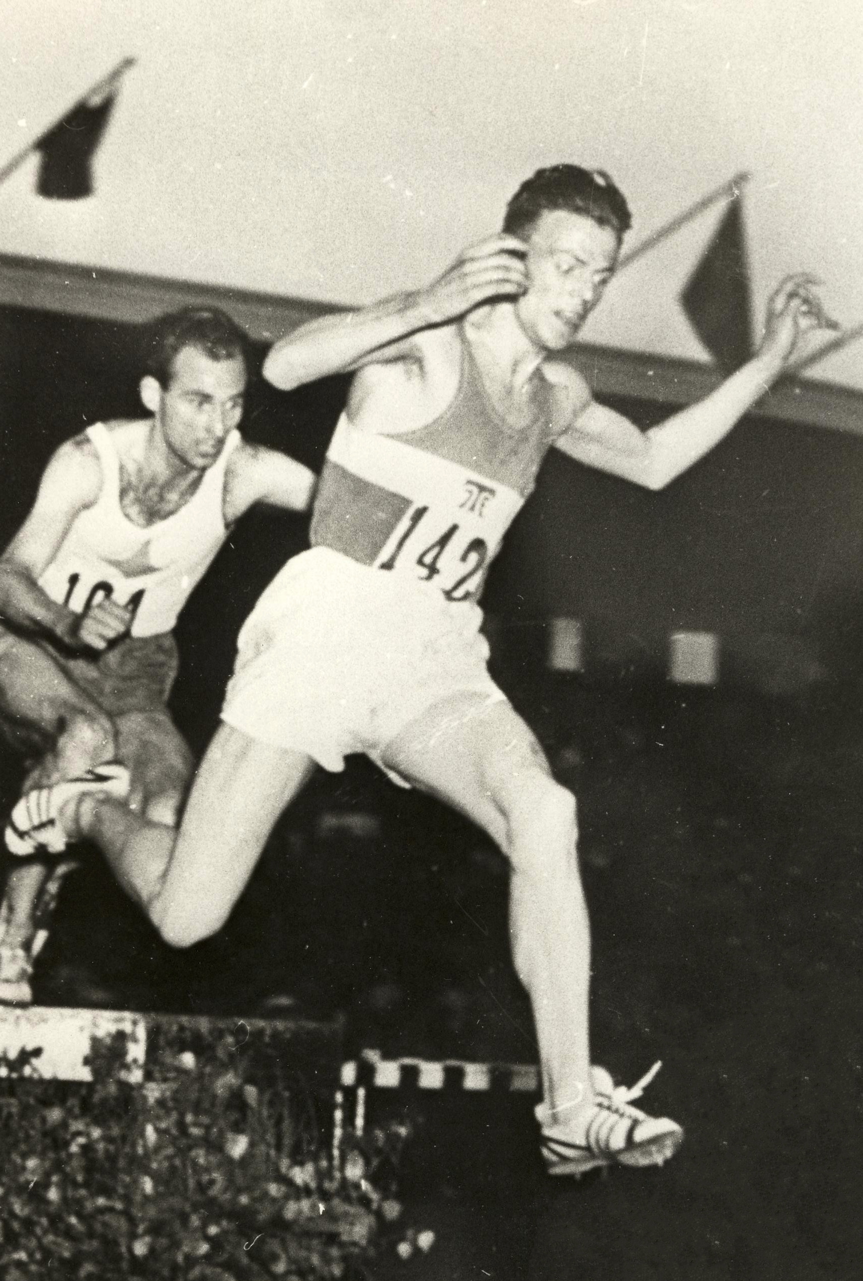 OS-uttagningarna till OS 1952. Curt Söderberg leder före Rainer Åsbrandt och i bakgrunden ses Gunnar Tjörnebo. (1952 Olympic Trials: Curt Söderberg leads before Rainer Åsbrandt and in the background is seen Gunnar Tjörnebo)